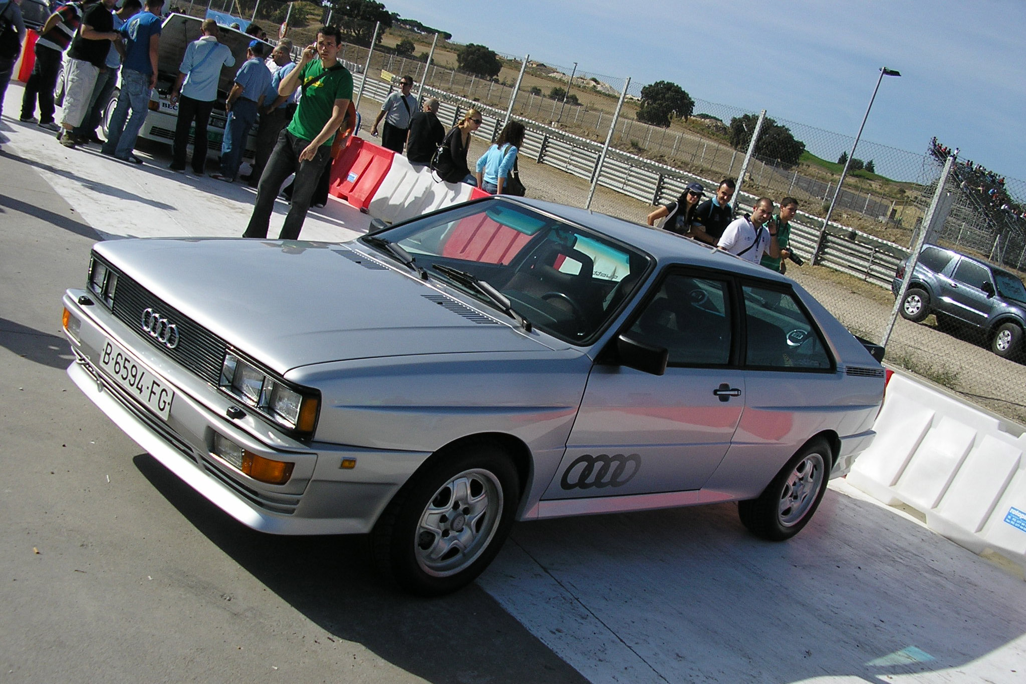 Audi quattro shown in Circuito del Jarama (Madrid). Jornada de puertas abiertas 2006.